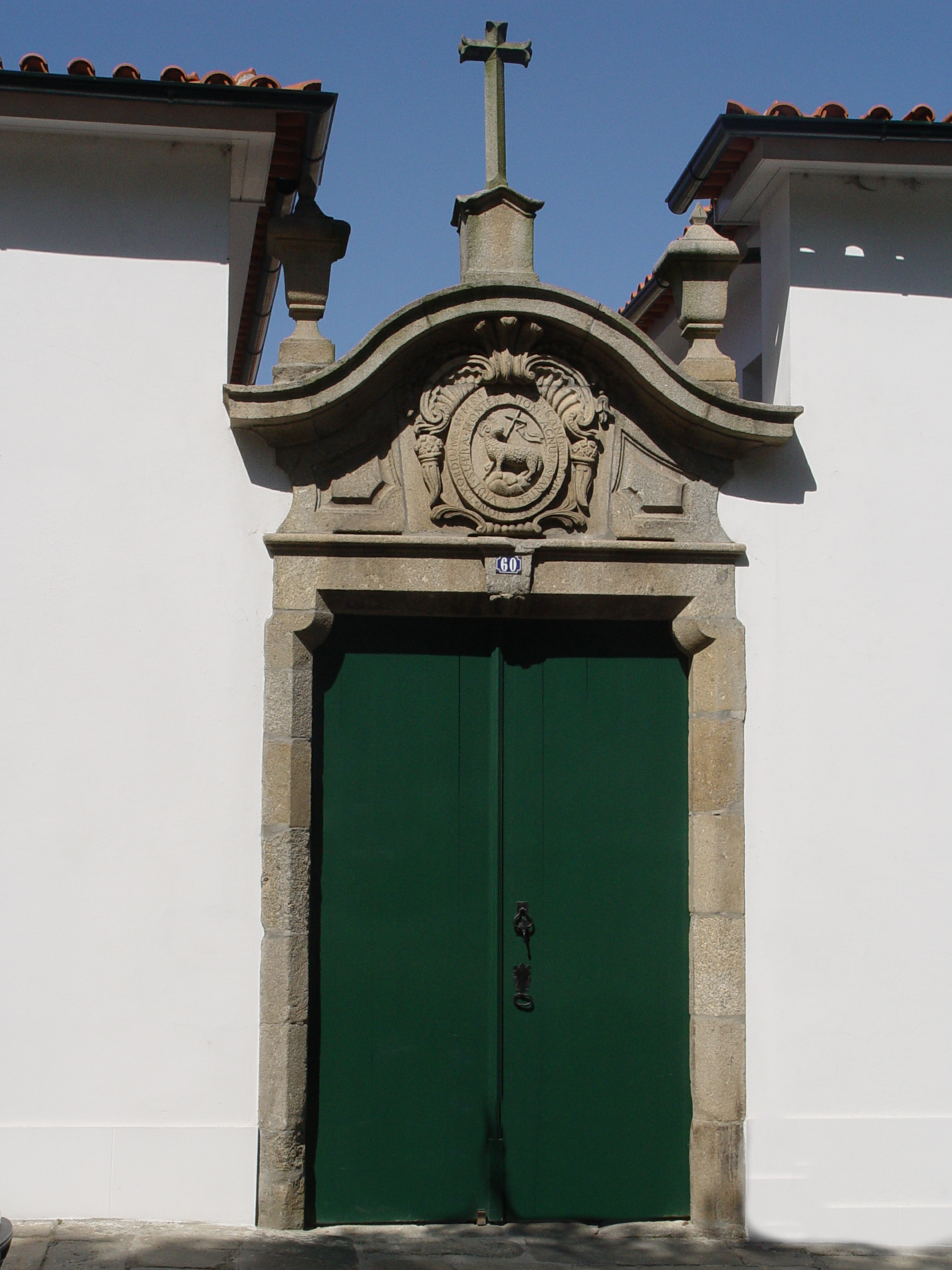 Casa do Igo door, in Braga Portugal